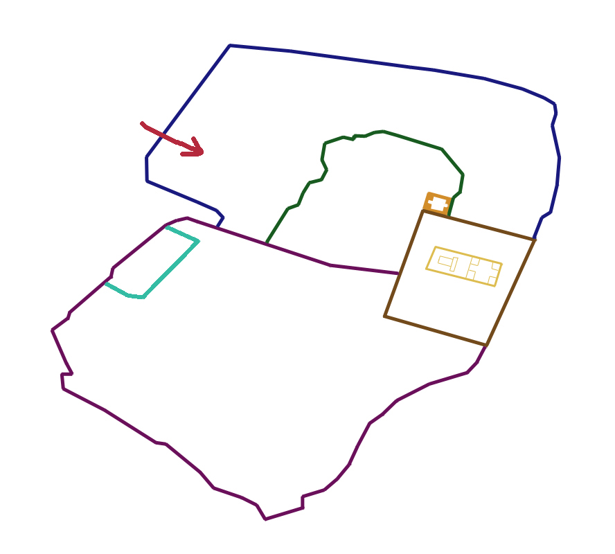 ירושלים 70 - הבקעת החומה השלישית